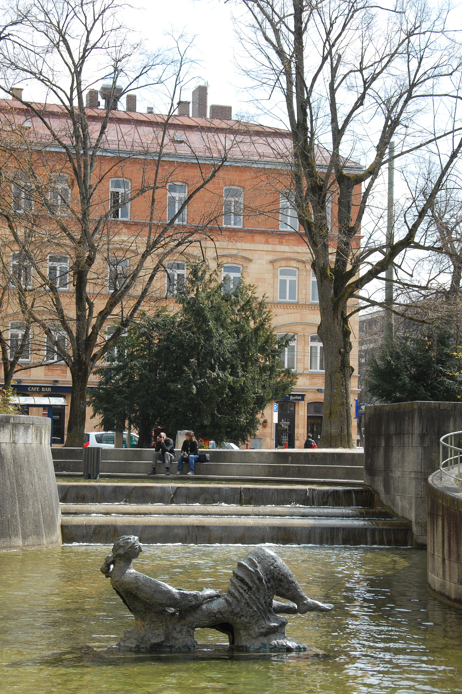 Neue_Pinakothek_027 in Munich/Germany